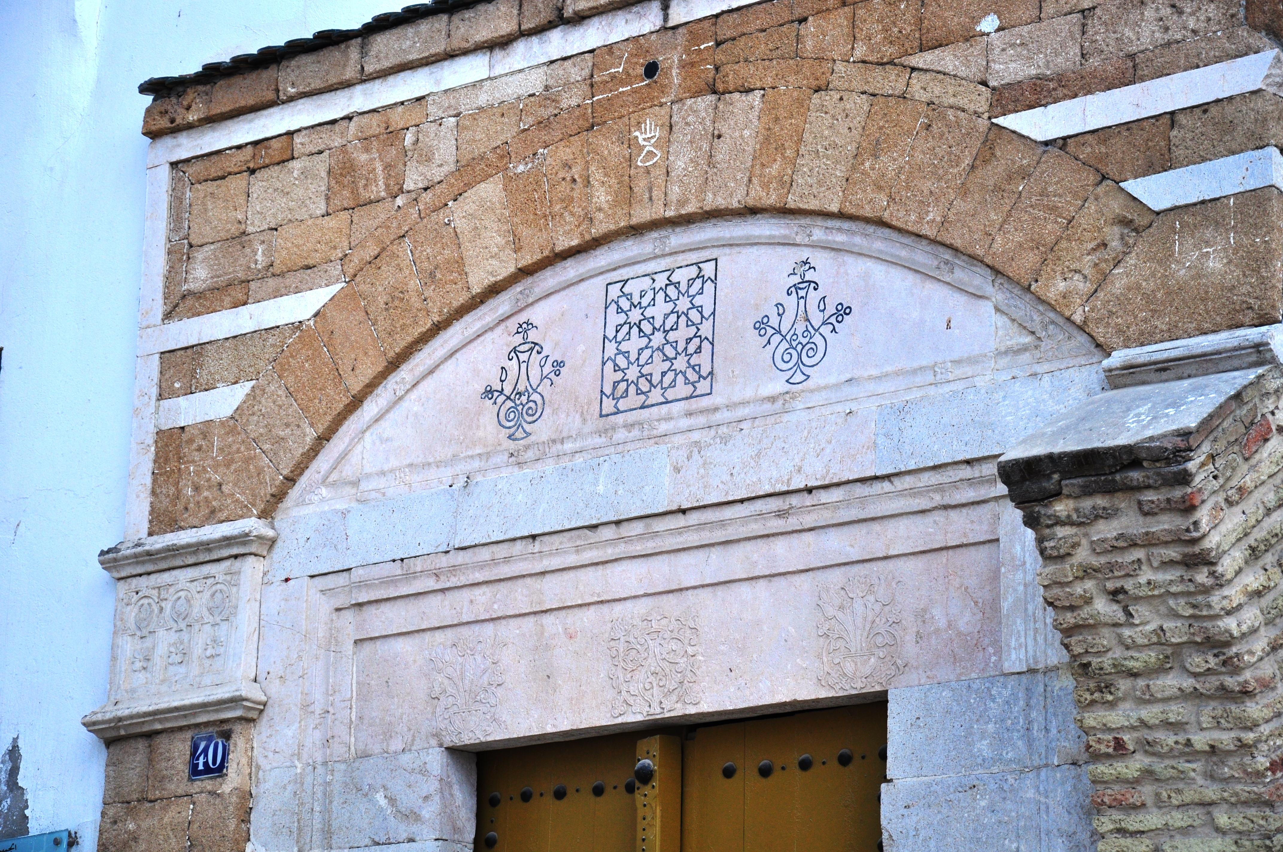 Mederça du Pacha